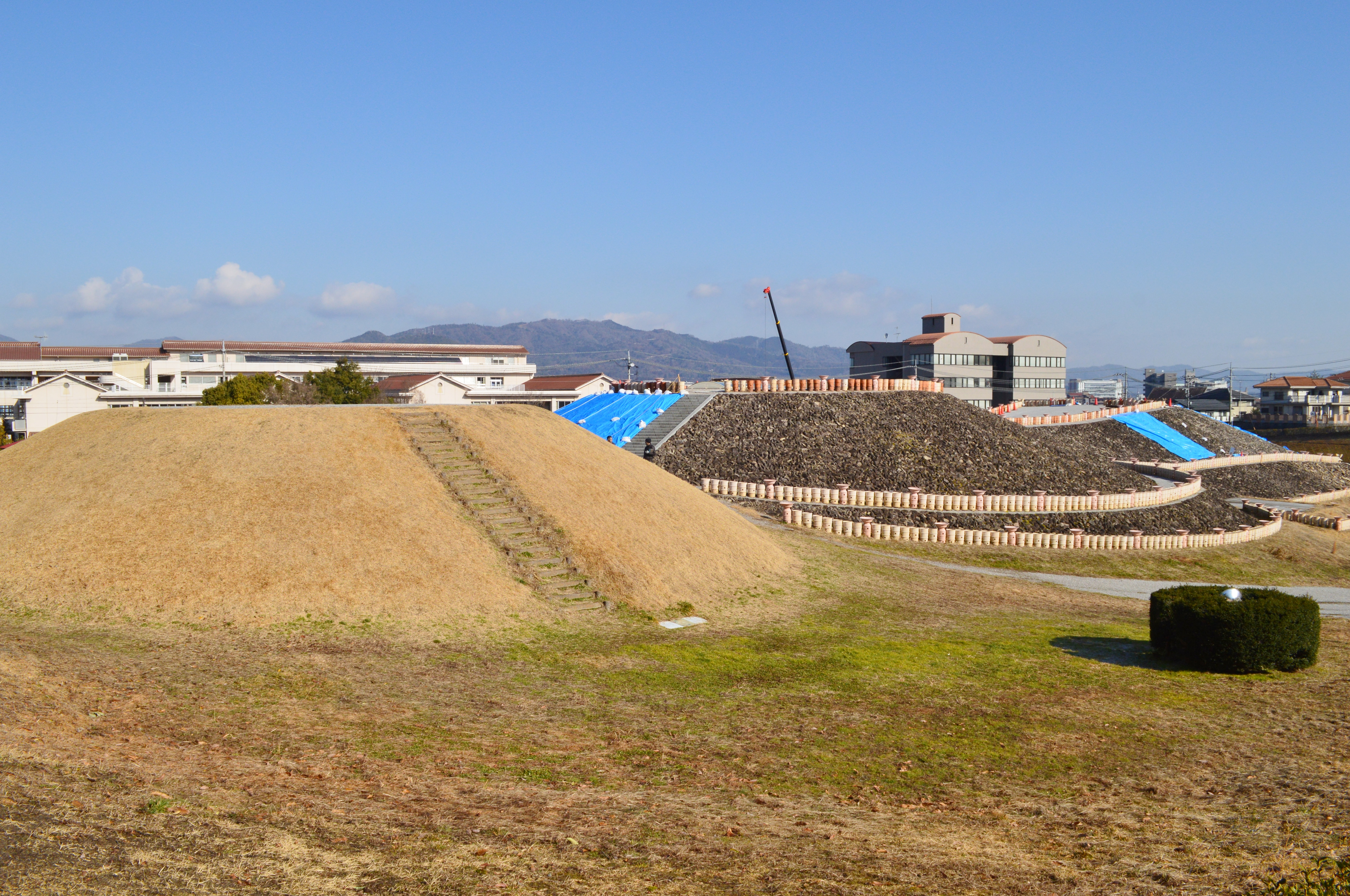 三ツ城1号墳と2号墳 遠景